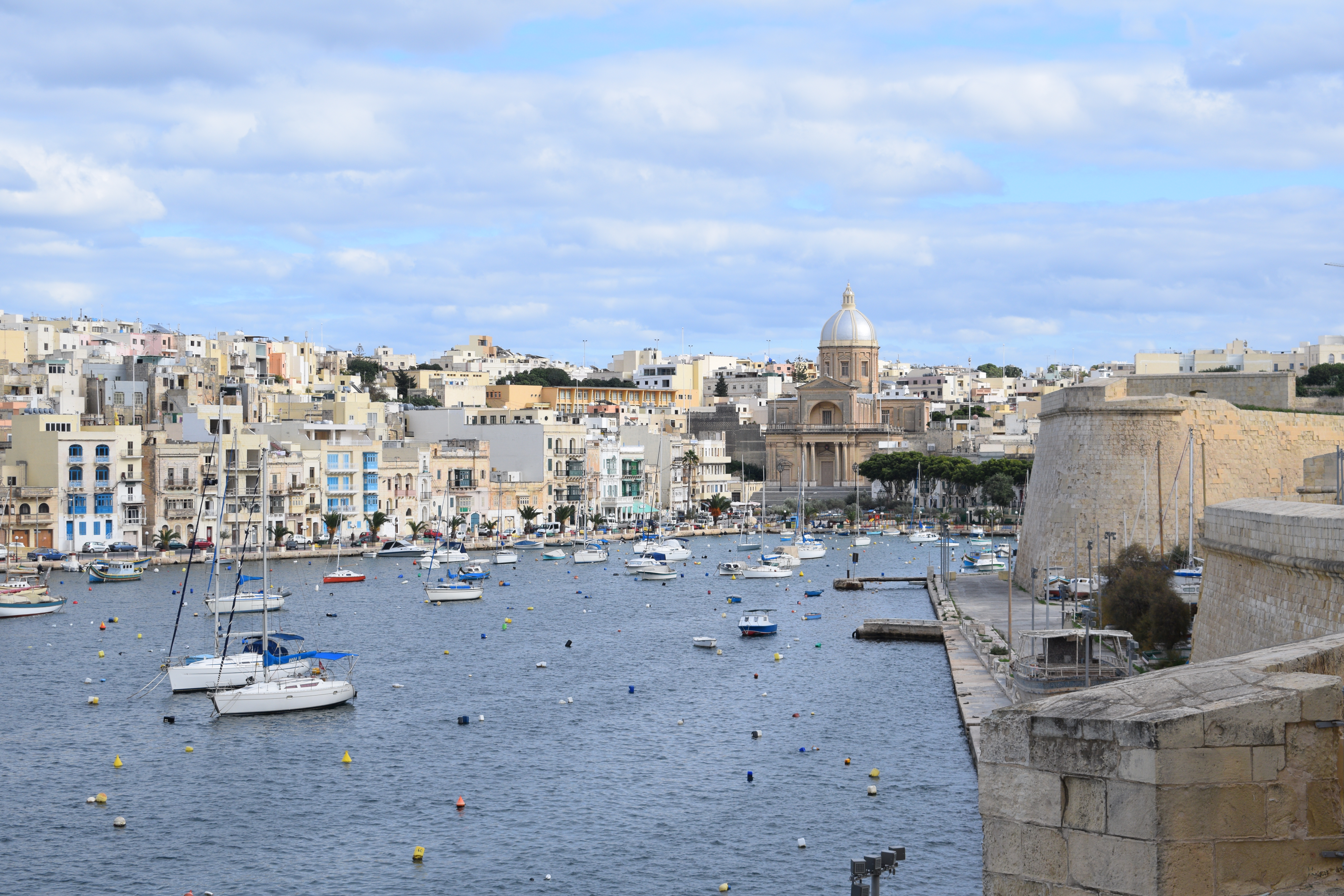 Kalkara. Malti: Il-Kalkara.